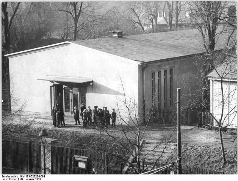 Zentralbild Biscan 20.2.1959 Das Puppentheater in Magdeburg In vielen Städten unserer Republik wurden in den letzten Jahren Puppenbühnen geschaffen, in denen Theater- und Märchenspiele speziell für unsere kleinen und kleinsten Kinder gezeigt werden. Als erste in der DDR erhielten die Magdeburger Kinder ein Puppentheater, das ausschließlich für diesen Zweck entworfen, gebaut und eingerichtet wurde. UBz: Blick auf das Puppentheater.